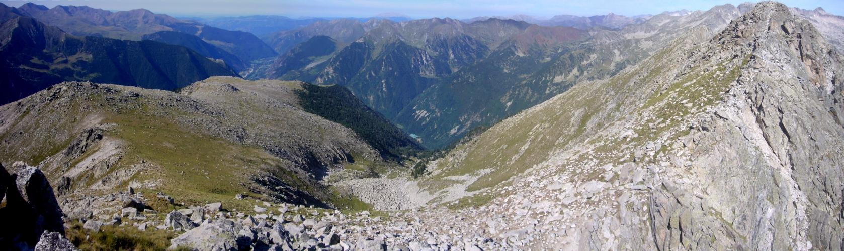 Vall de Comaltes, vista des del més oriental dels Pics de Comaltes; la Vall de Boí, Alta Ribagorça, Catalunya